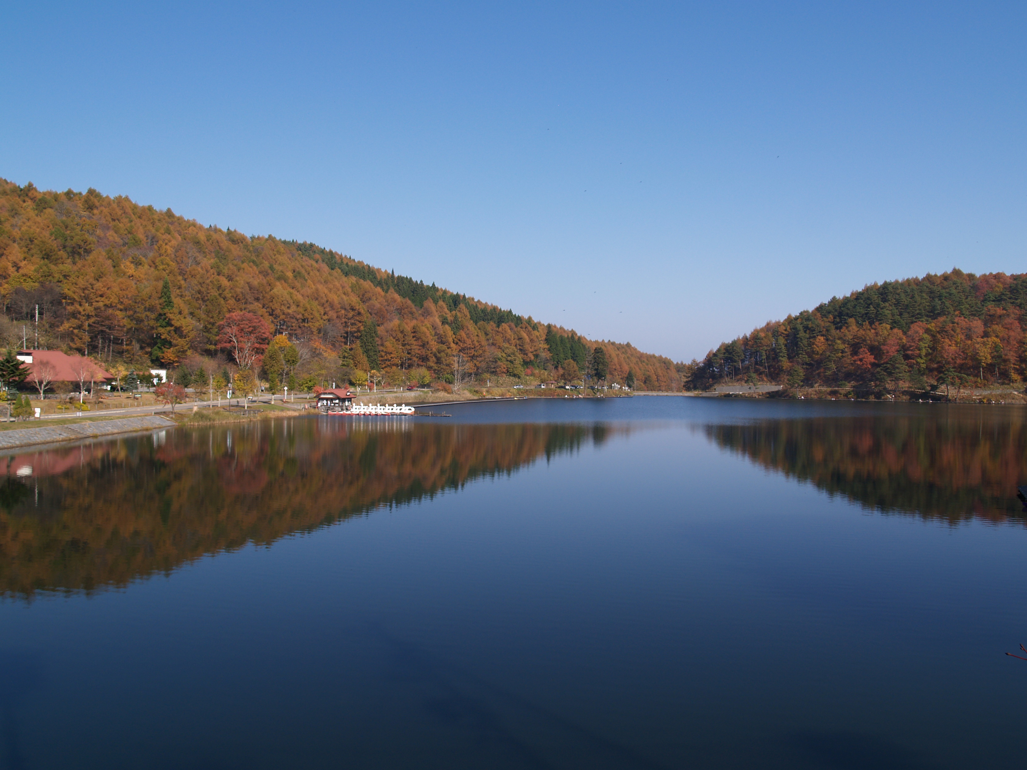 聖湖（長野県麻績村、聖高原）